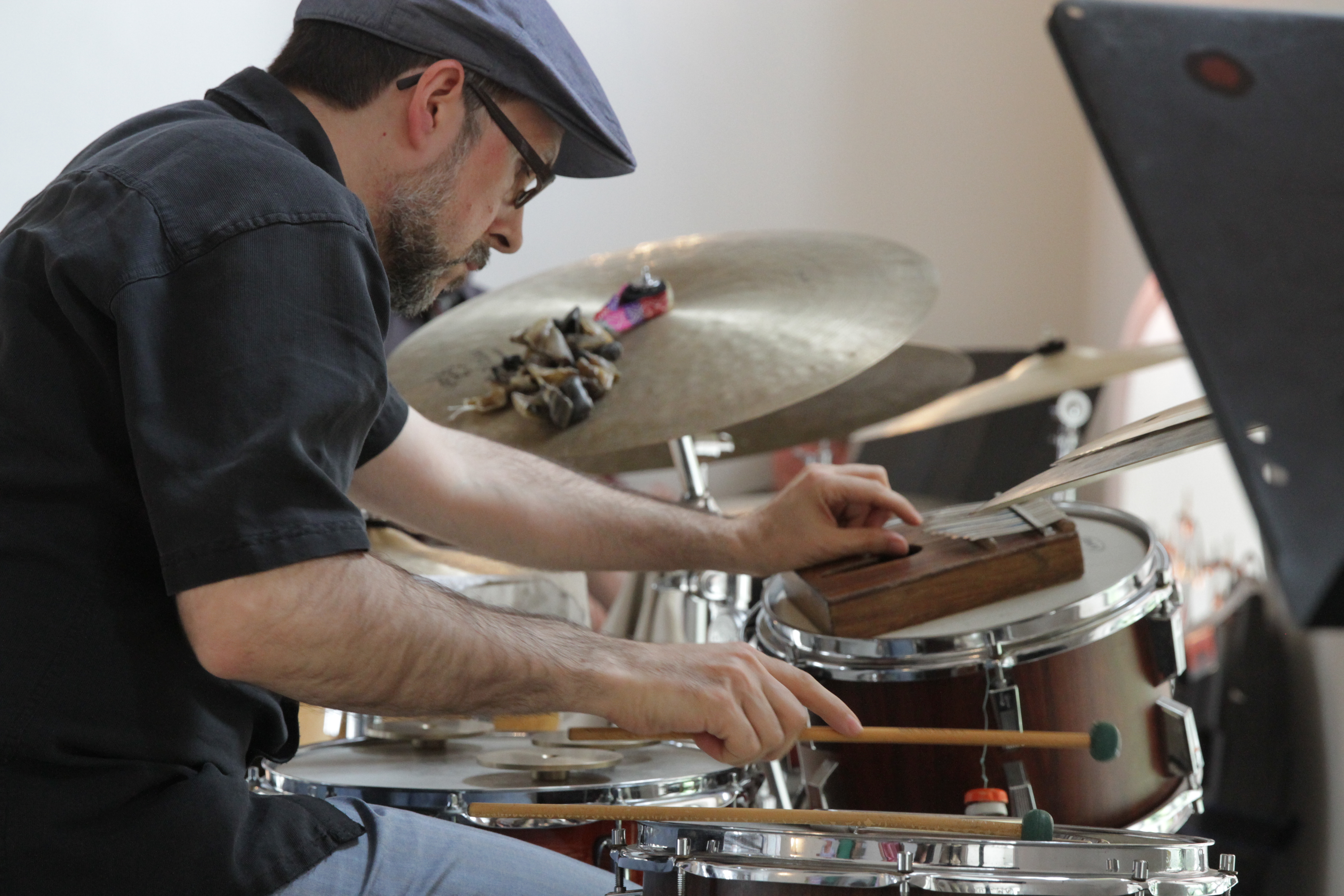 Tonspuren 2014 - John Hollenbeck an Percussion Schlagzeug Festivalsommer This photo was created with the support of donations to Wikimedia Deutschland in the context of the CPB project "Festival Summer". This file is made available under the Creative Commons CC0 1.0 Universal Public Domain Dedication. The person who associated a work with this deed has dedicated the work to the public domain by waiving all of their rights to the work worldwide under copyright law, including all related and neighboring rights, to the extent allowed by law. You can copy, modify, distribute and perform the work, even for commercial purposes, all without asking permission. Thomas Springer Personality rights warningAlthough this work is freely licensed or in the public domain, the person(s) shown may have rights that legally restrict certain re-uses unless those depicted consent to such uses. In these cases, a model release or other evidence of consent could protect you from infringement claims.